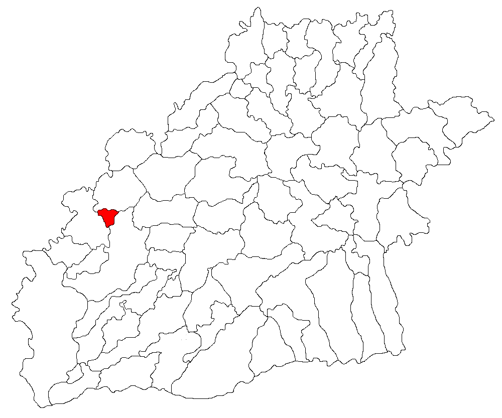 Categorie:Hărţi ale judeţului Sibiu